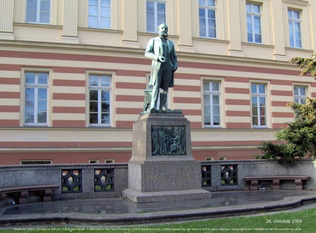 Kekule-Denkmal in Bonn